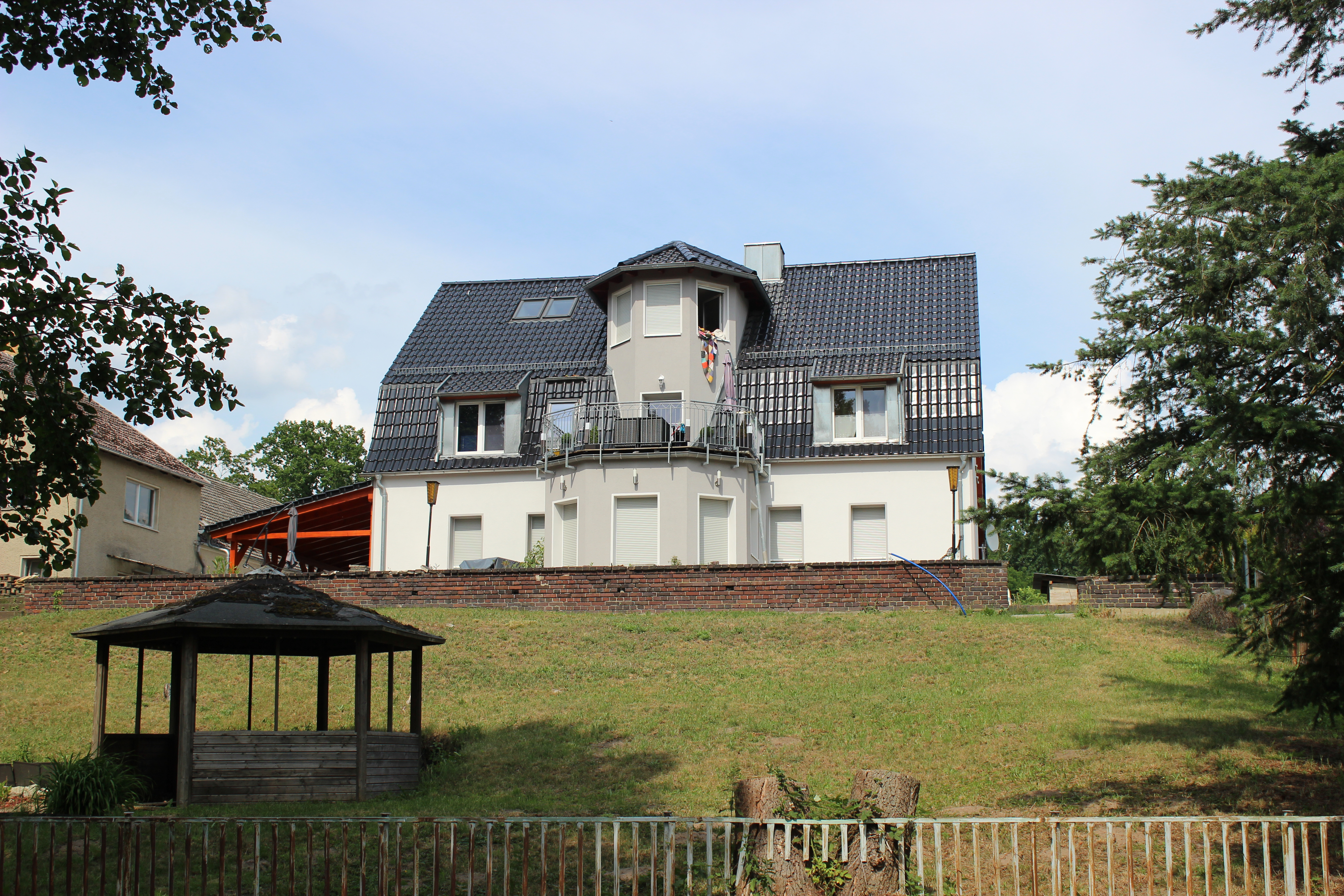 Das Falladahaus in seinem jetzigen Zustand (Stand 2017)